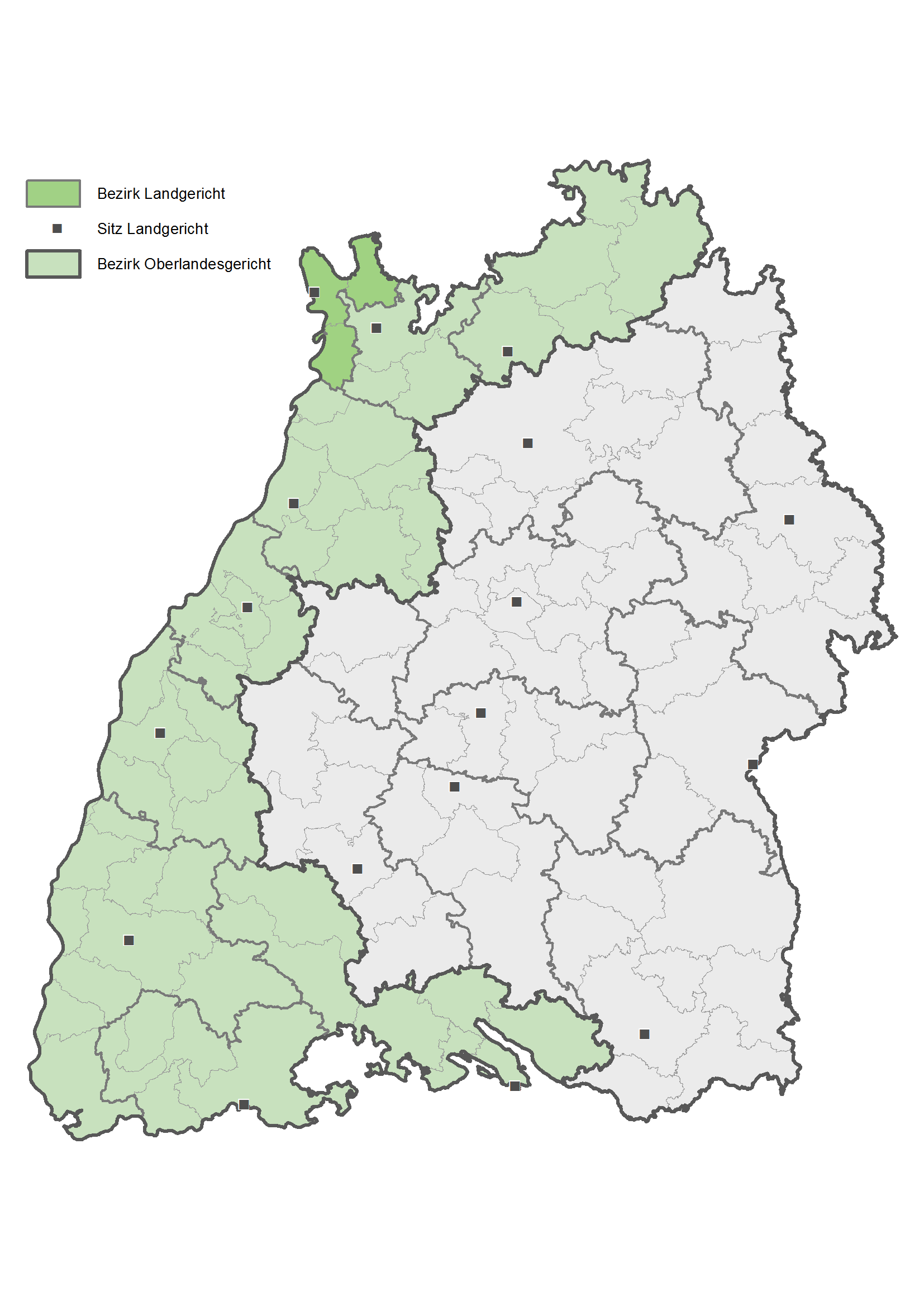 Karte des Bezirks des Landgerichts Mannheim in Baden-Württemberg